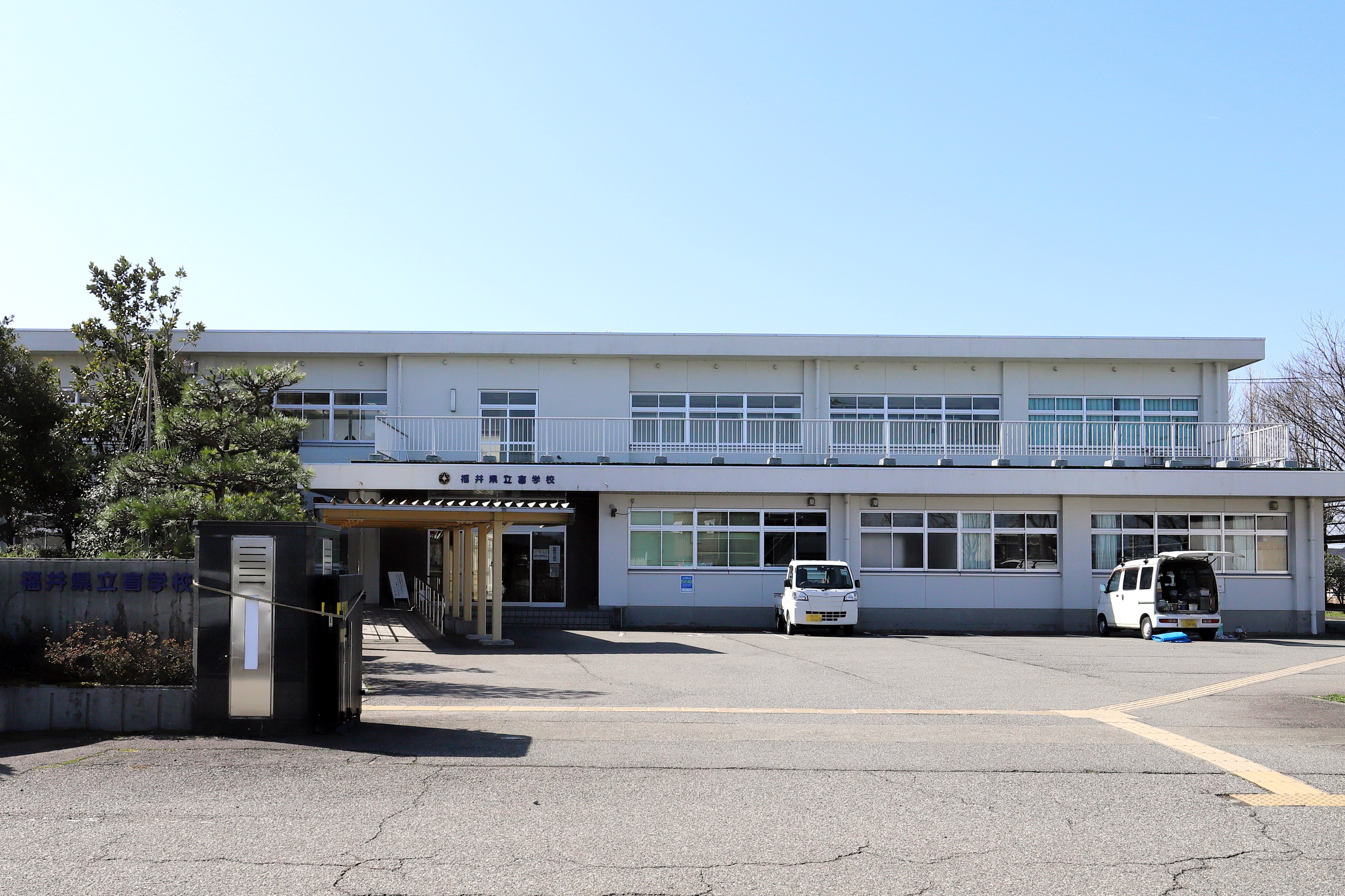 福井県立盲学校